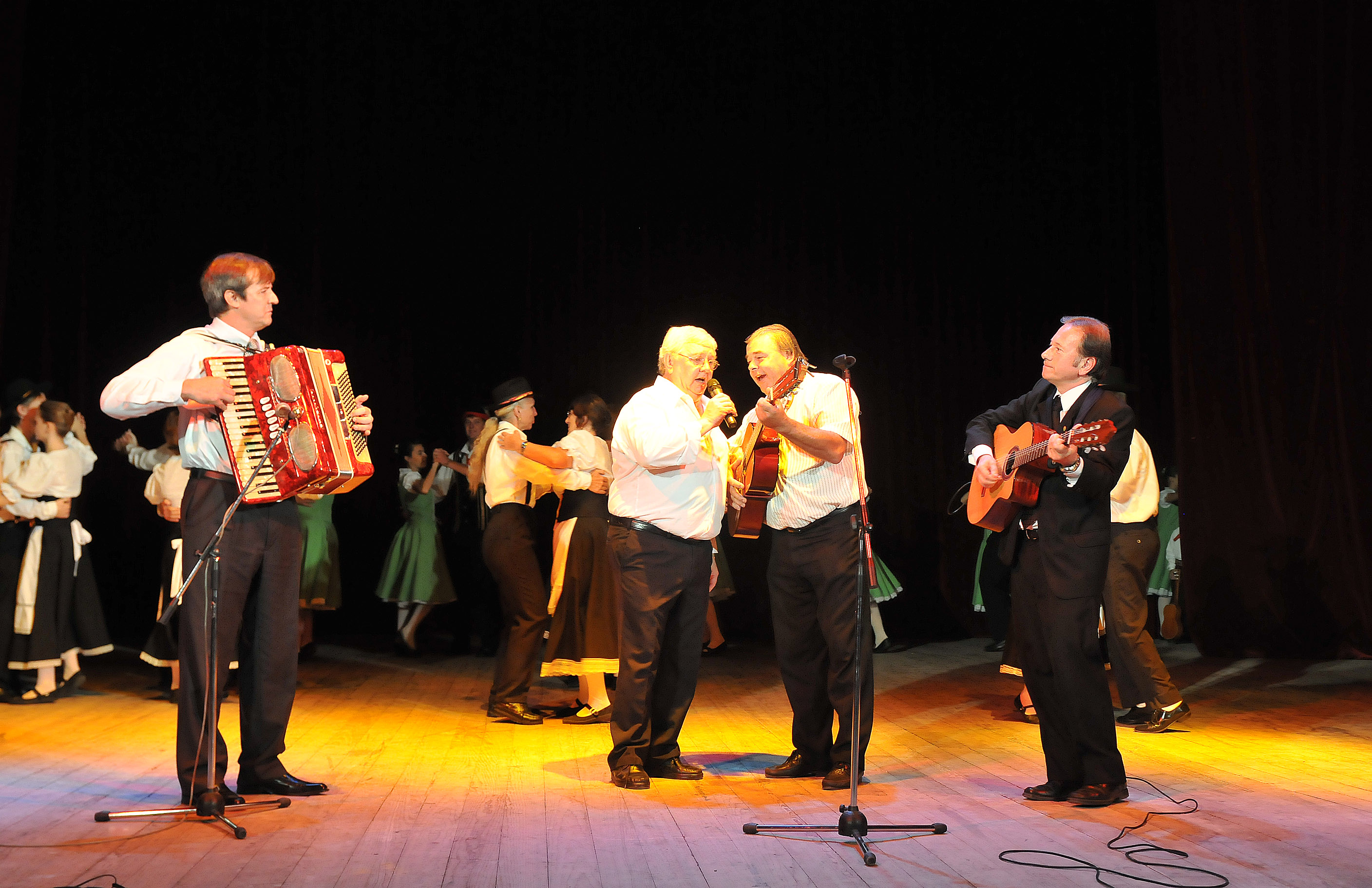 El Ministro de Gobierno y Justicia de Entre Ríos, Adán Bahl y el Secretario de Cultura Roberto Romani, asistieron en representación del Gobierno provincial, al festejo por el Día del Alemán del Volga, realizado en el Teatro 3 de Febrero de Paraná. Los funcionarios provinciales interpretaron, con el acordeón y la guitarra, música para acompañar a la tradicional celebración.